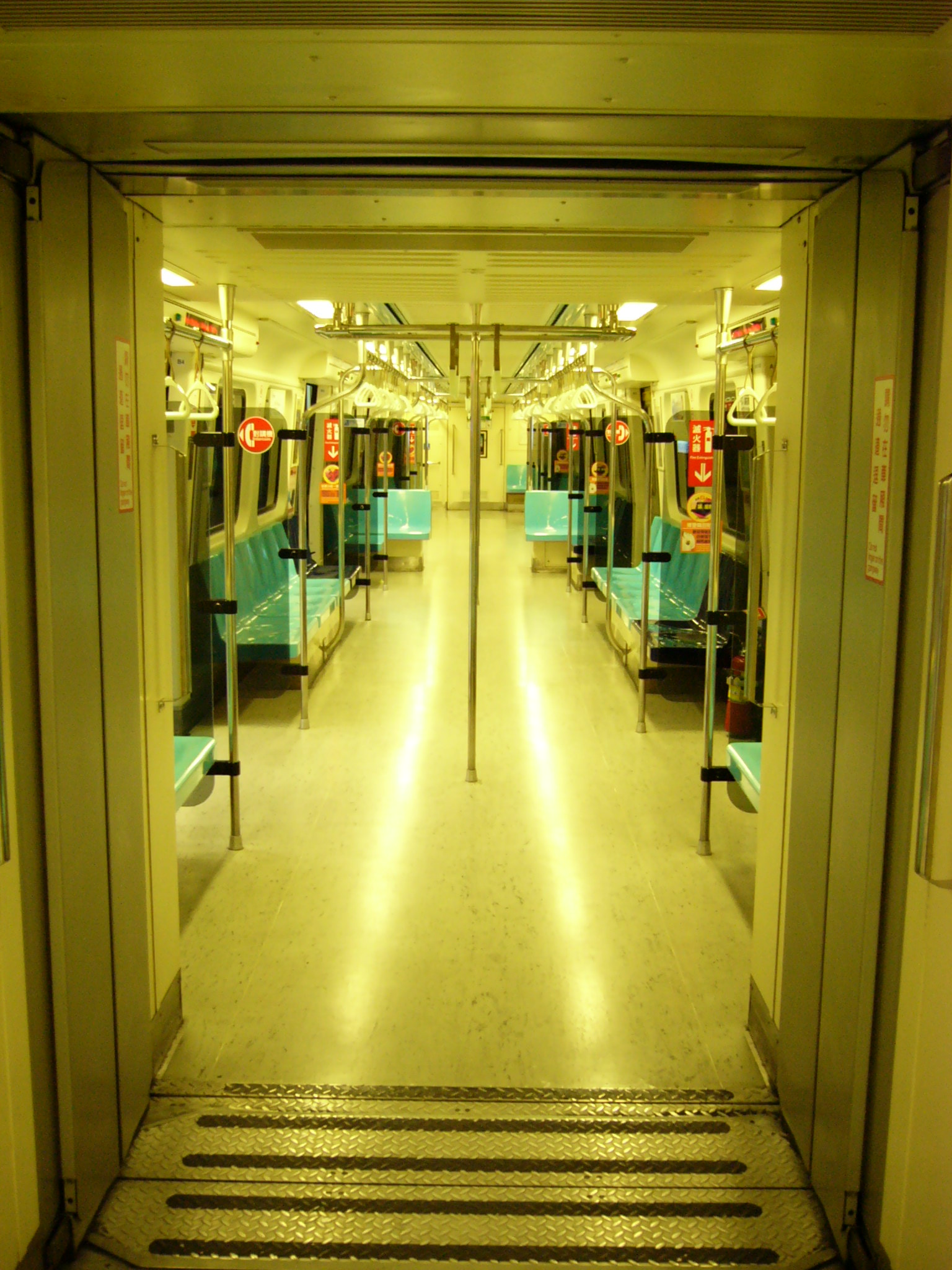 台北捷運321型電聯車動力駕駛車1148內裝